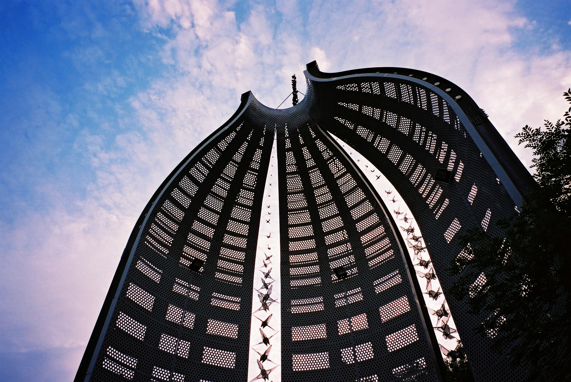 紀念碑以象徵「慈悲與博愛」的不銹鋼「蓮花座」來襯托紀念講台，以象徵「和平」的不銹鋼「摺紙鶴」，遙遙相對在群眾廣場另一端，並以象徵台灣鄉土的蕃薯藤形塑避雷針。 「蓮花座」與「摺紙鶴」之間為一個可容納兩千人的綠地斜坡大廣場，紀念講台以「追思壇」形成一個可供戶外音樂演奏的圓形音樂台。「蓮花座」、「追思壇」、「群眾廣場」所形成的空間，宛如一座希臘戶外廣場，「蓮花座」的不銹鋼版儼然是一面音響反射板，可將音樂台上的音樂，傳達到廣場上的每一角落，夜間的投光照明，以間接反射的方式打亮蓮花座，有如一?出淤泥而不染的蓮花，藉以紀念二二八事件的英靈。